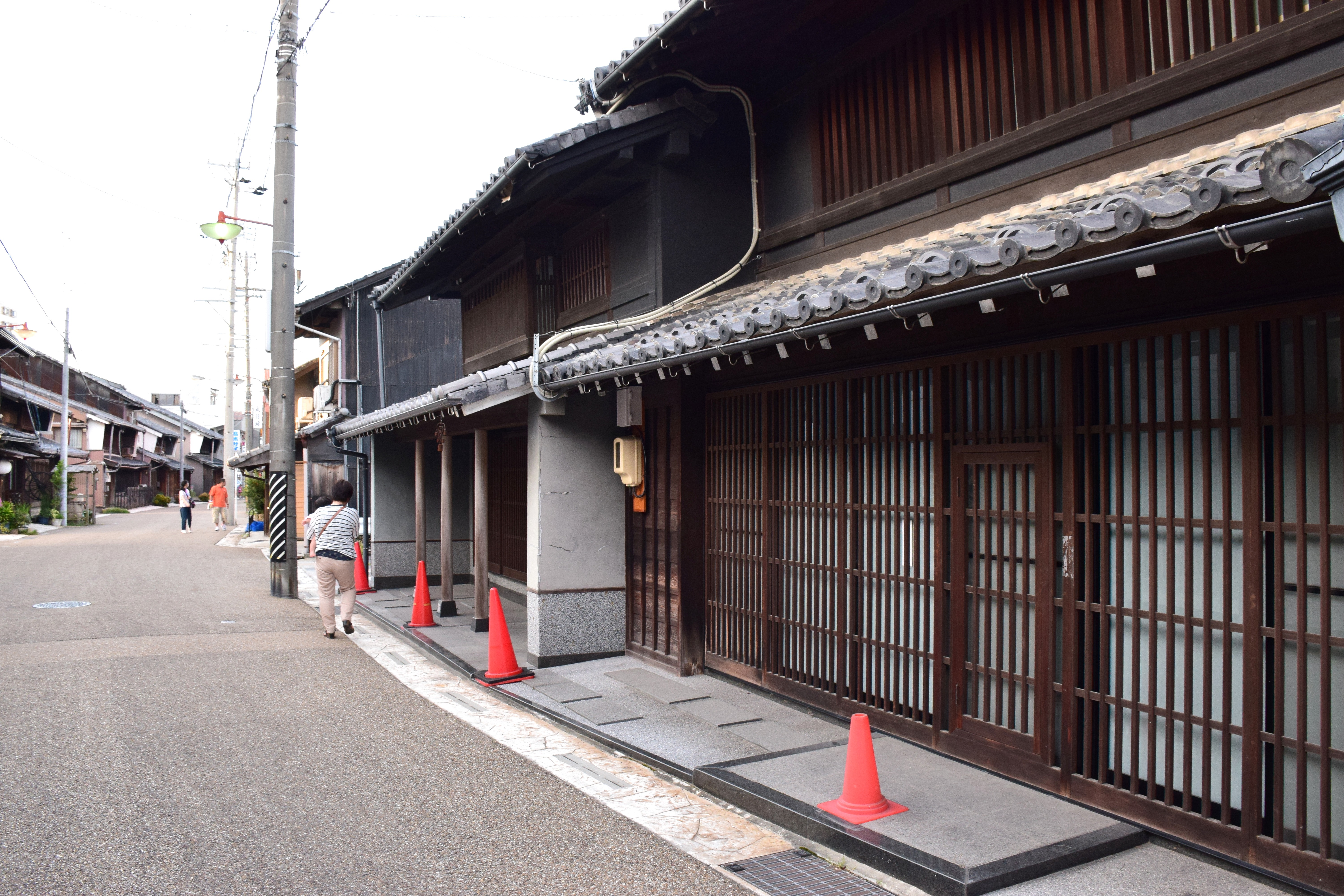 津島神社の門前町